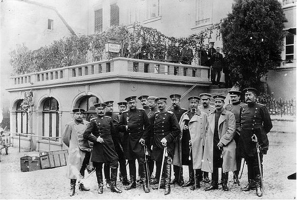 Paul von Hindenburg feiert während des Kaisermanövers in Lebach seinen 50. Geburtstag